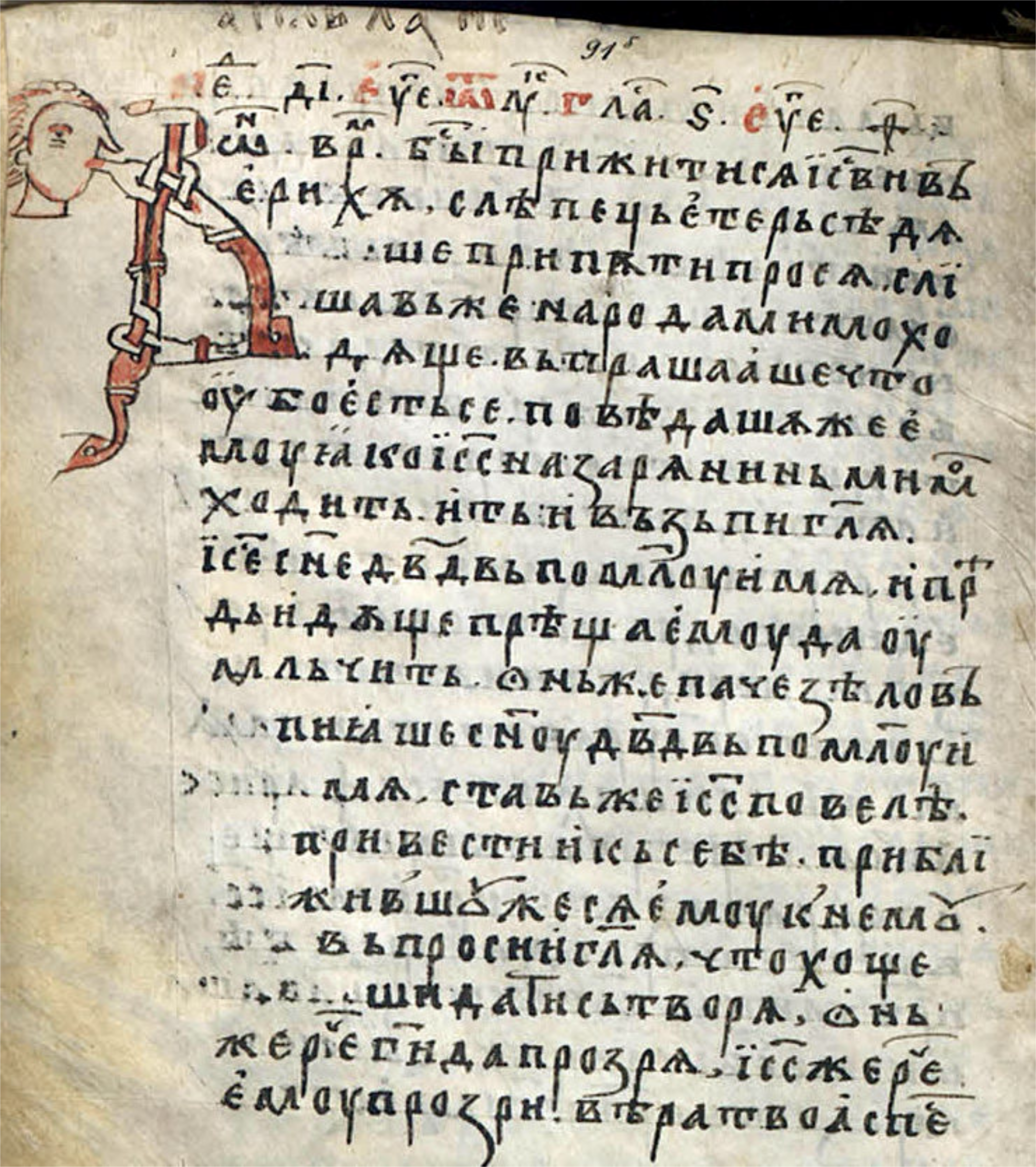 Врачанско евангелие